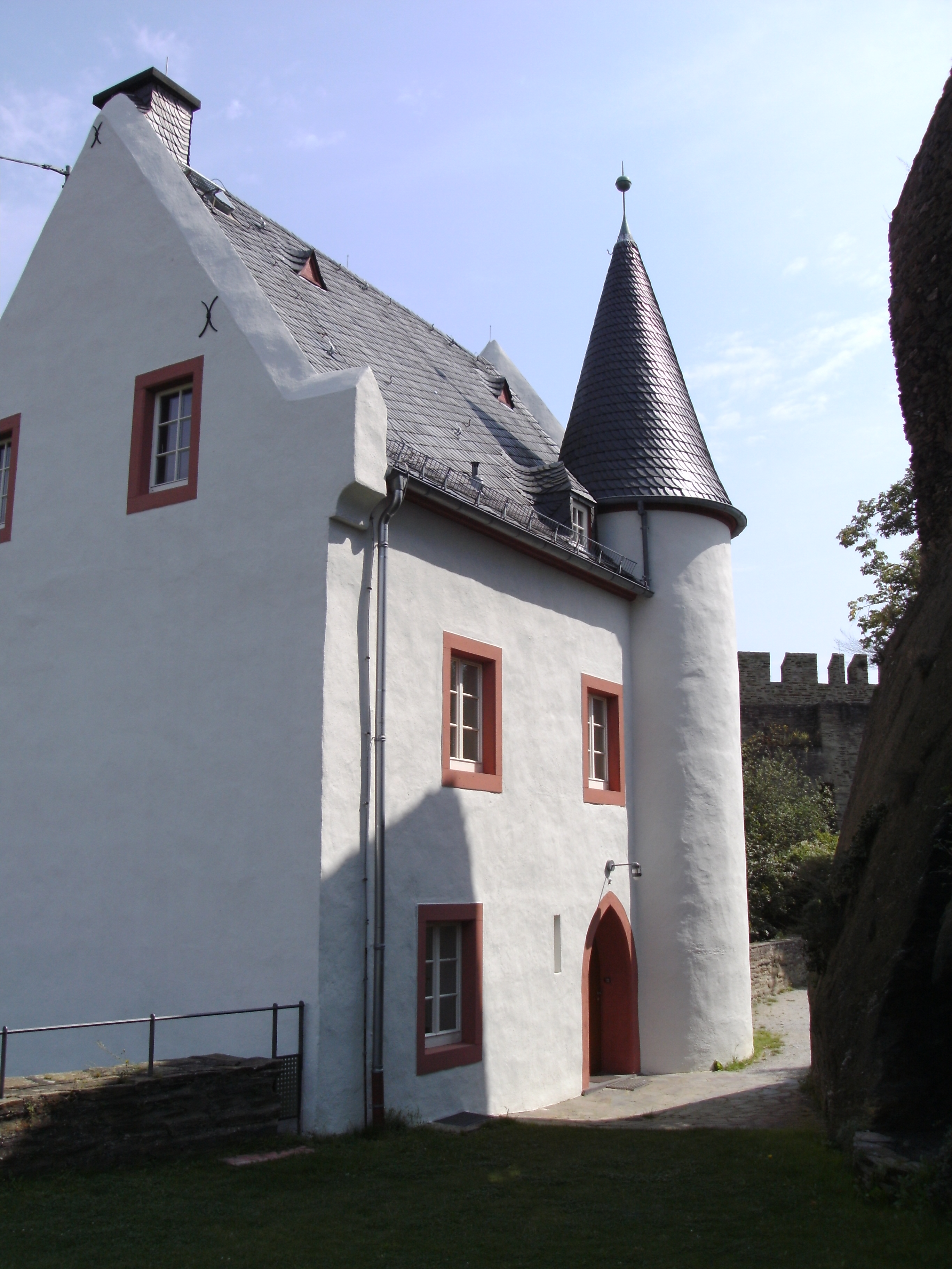 Das Frauenhaus von Burg Sterrenberg